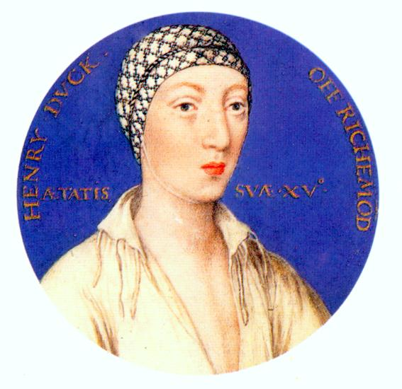 portrait miniature